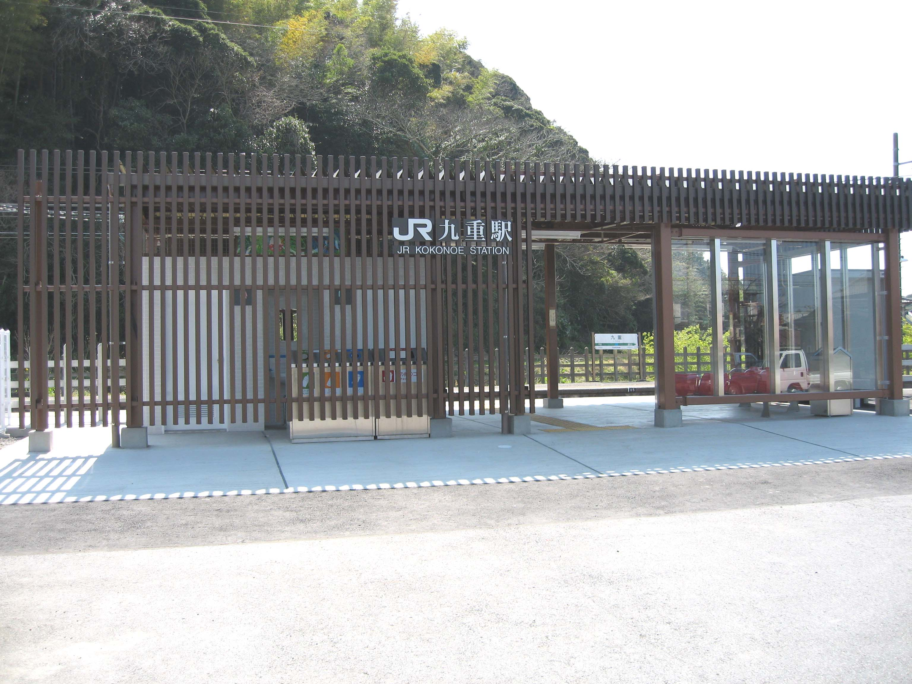 Kokonoe Station, Uchibo Line, Chiba, Japan, 九重駅駅舎（2007年新築）